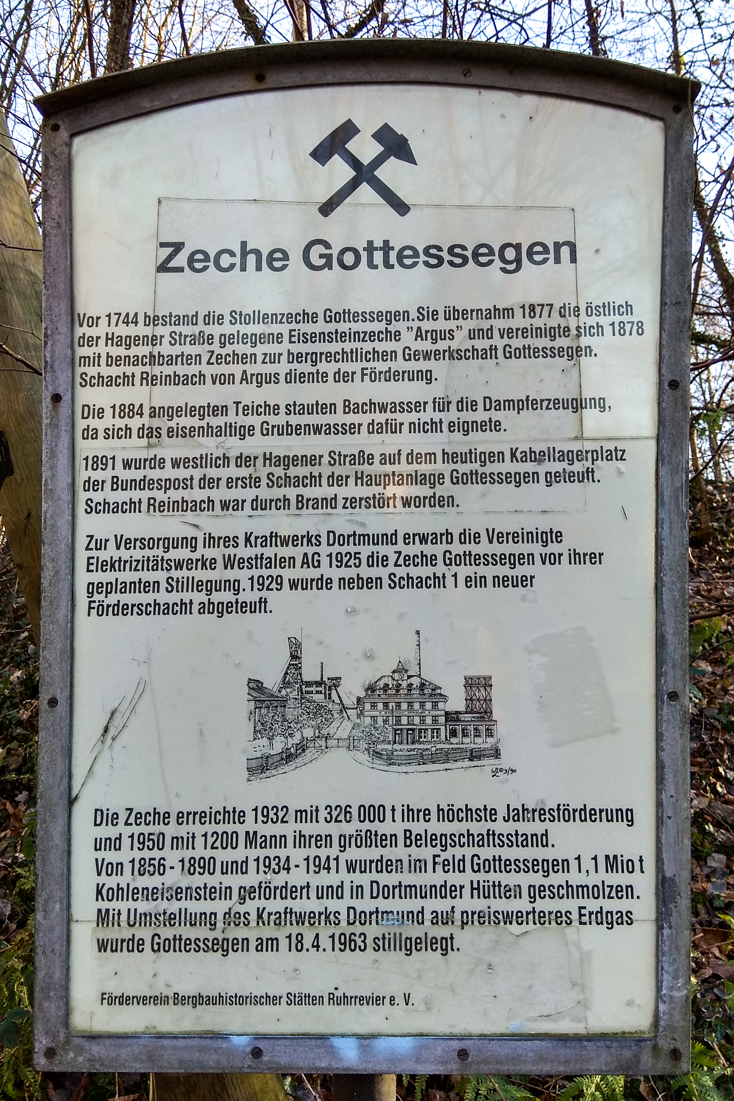 Historie der Zeche Gottessegen in Dortmund-Kirchhörde